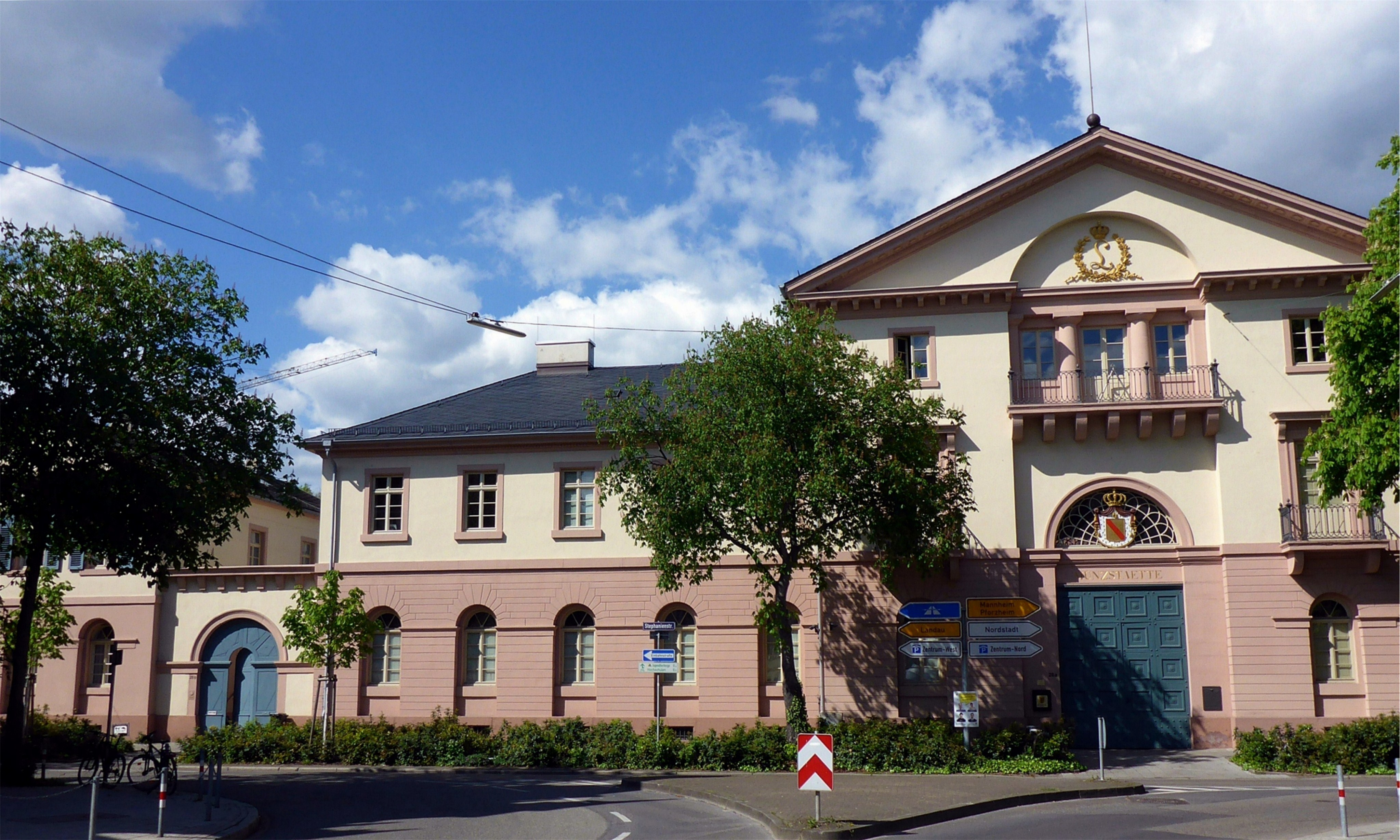 Die Staatliche Münze Karlsruhe